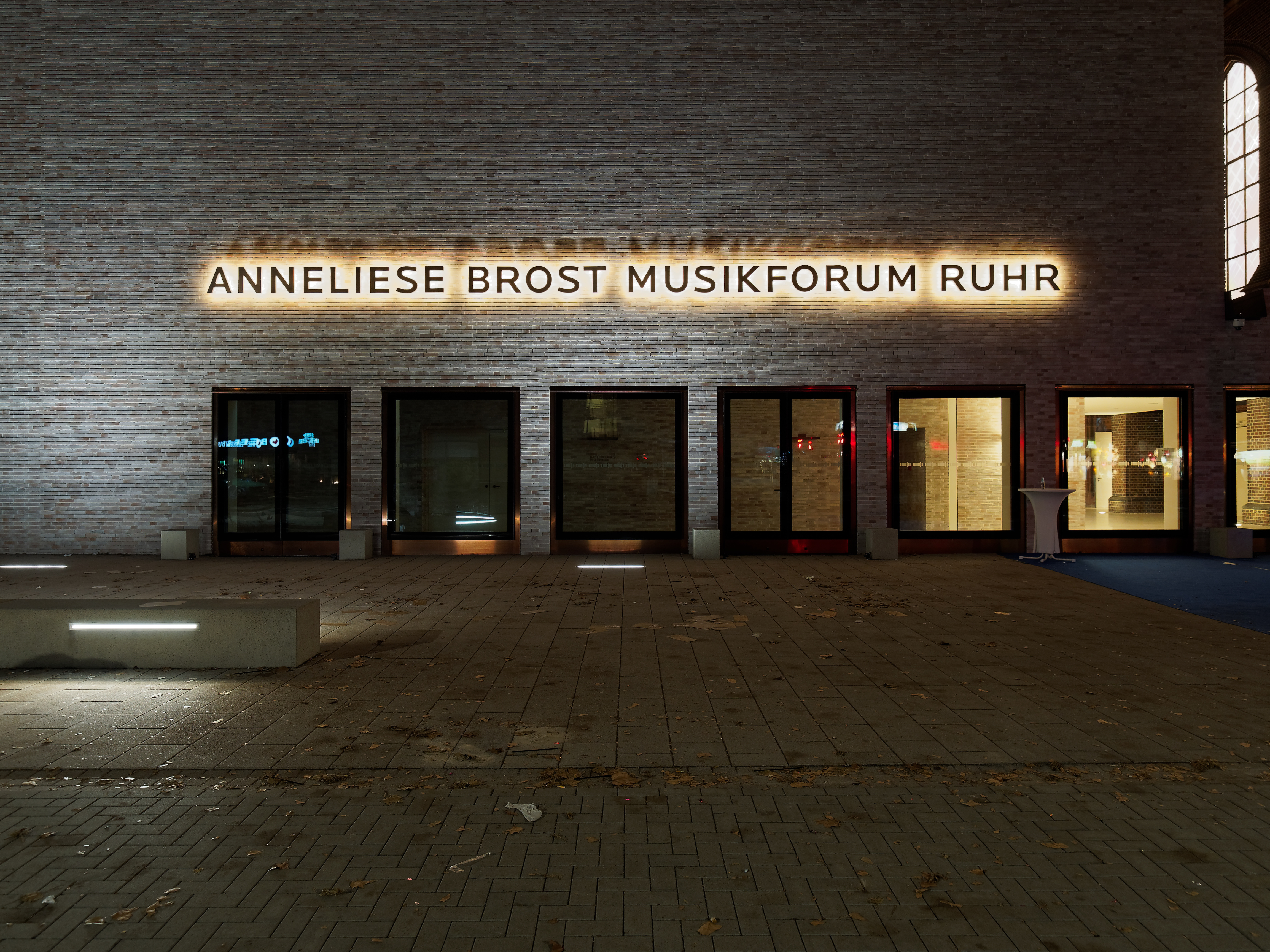 Anneliese Brost Musikforum Ruhr in Bochum, Ostseite des großen Saales